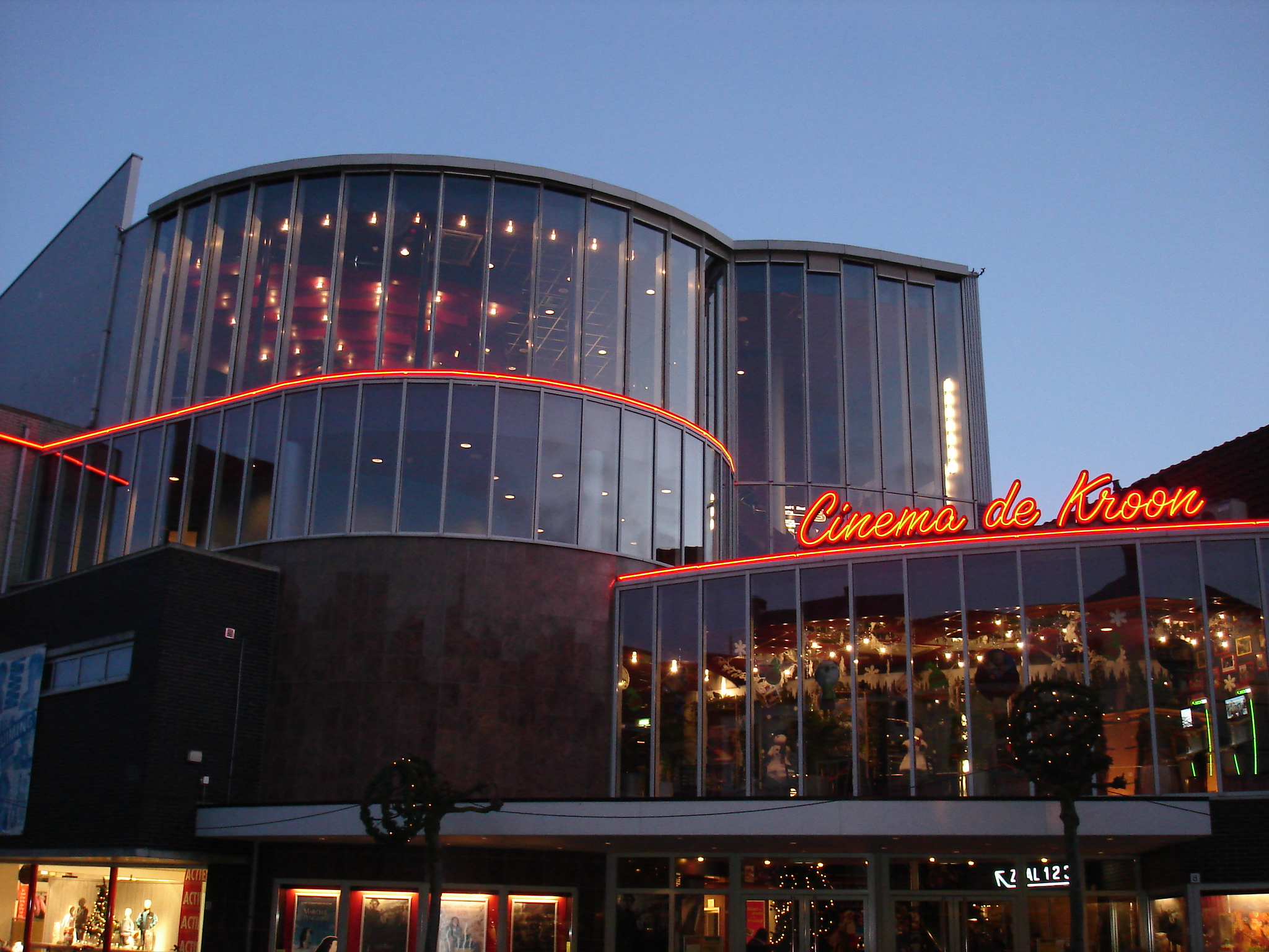 Omschrijving